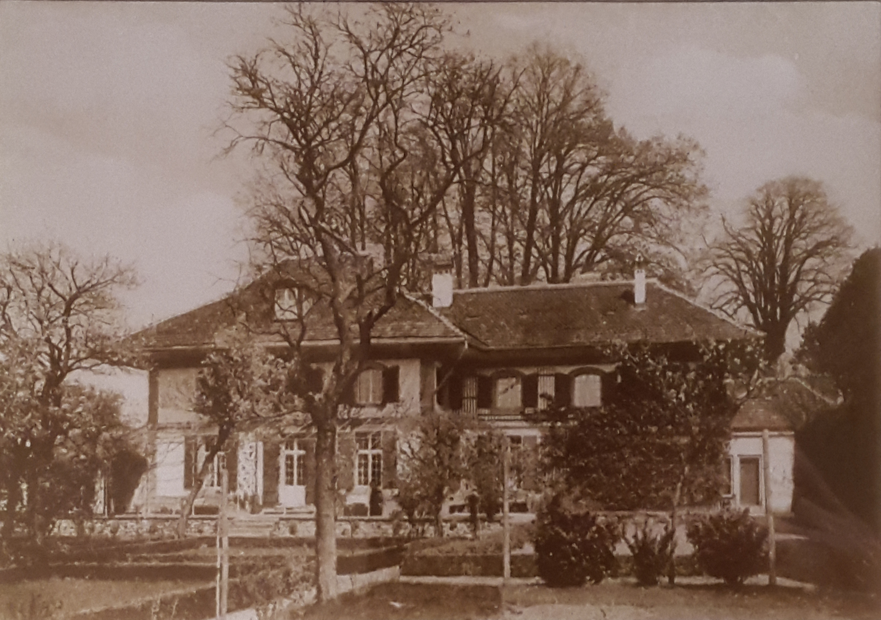 Bern, Campagne Mon Repos (abgebrochen).